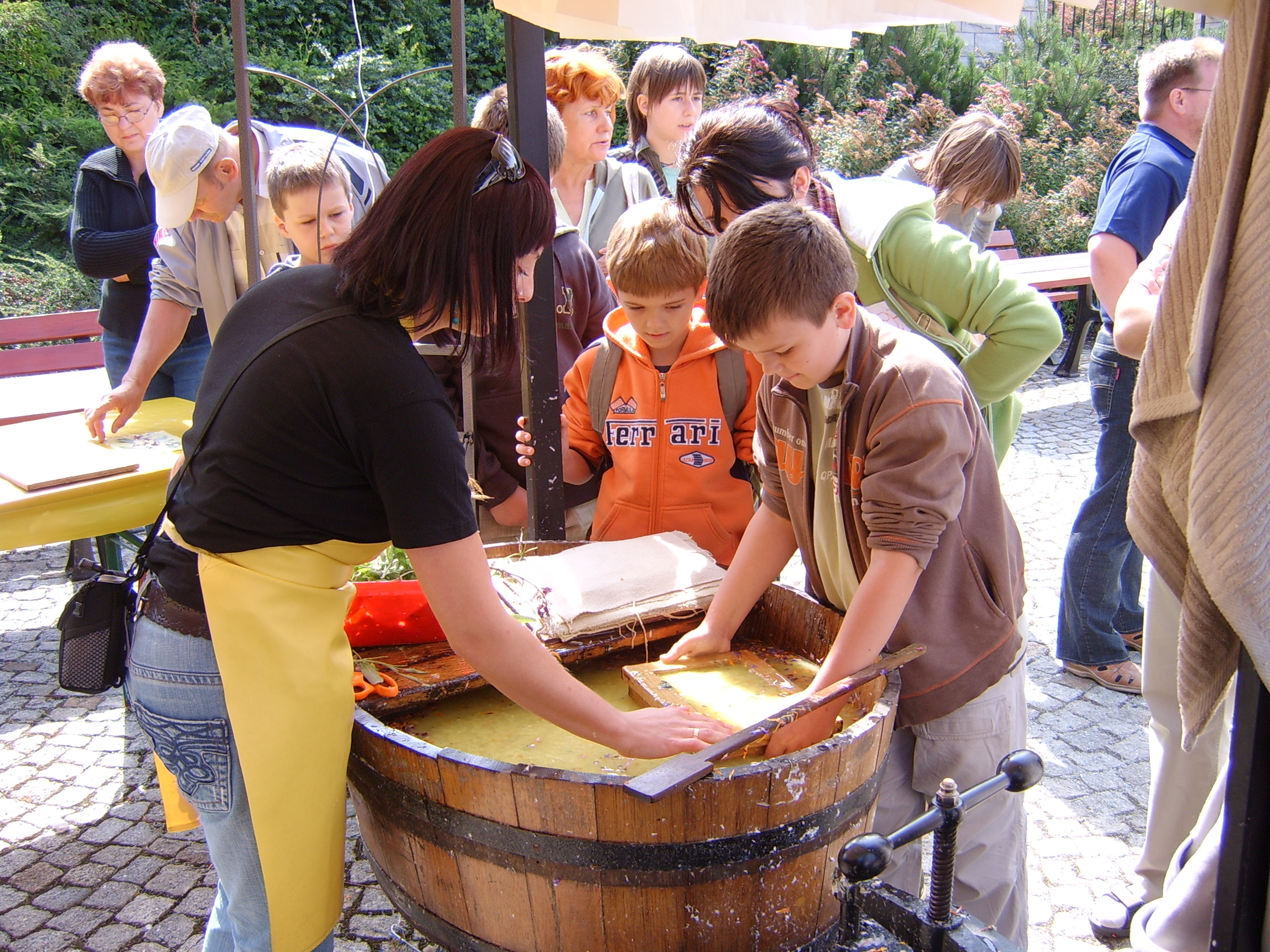 Muzeum Papiernictwa w Dusznikach-Zdroju – festyn z okazji Święta Papieru.